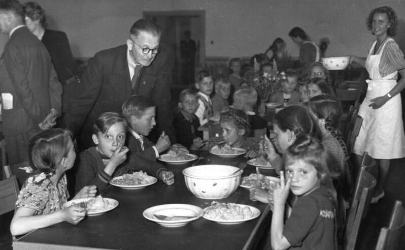 Koserow, Kinder-Kurhaus, Besuch vom Minister Illus-Schwahn Im Kinder-Kurhaus "Lieselotte Herrmann" in Koserow, 1949. Der Minister für Arbeit und Sozialfürsorge des Landes Mecklenburg, Burmeister, im Gespräch mit kleinen Kurgästen. 3324-49 Abgebildete Personen: Burmeister, Friedrich Dr.: Minister für Post- und Fernmeldewesen, DDR